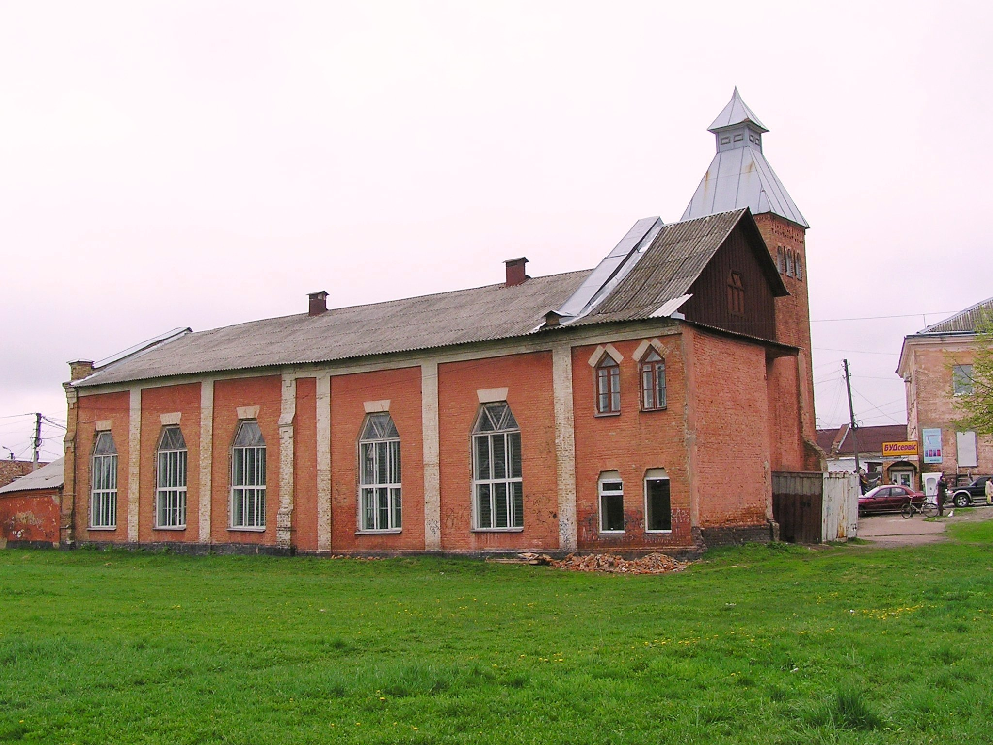 Будинок першої в Ніжині міської електростанції, вул. Московська,3, м.Ніжин